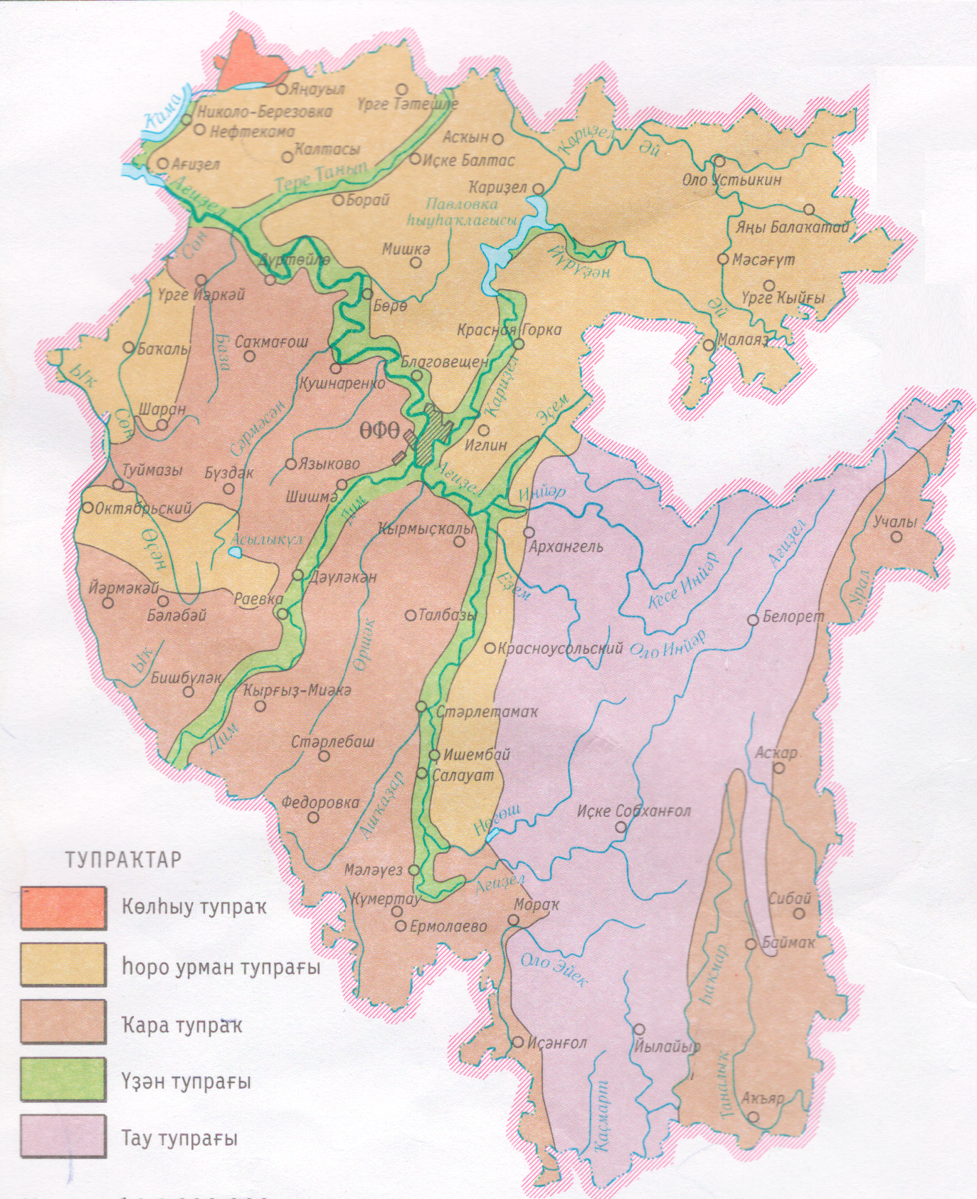 Башҡортса: Башҡортостан тупраҡтары